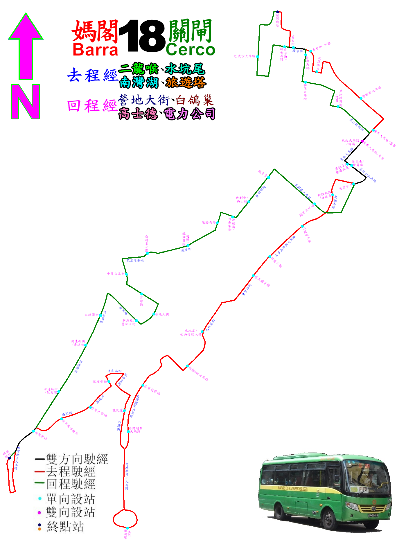 中文（香港）: 澳門巴士18線的走線圖